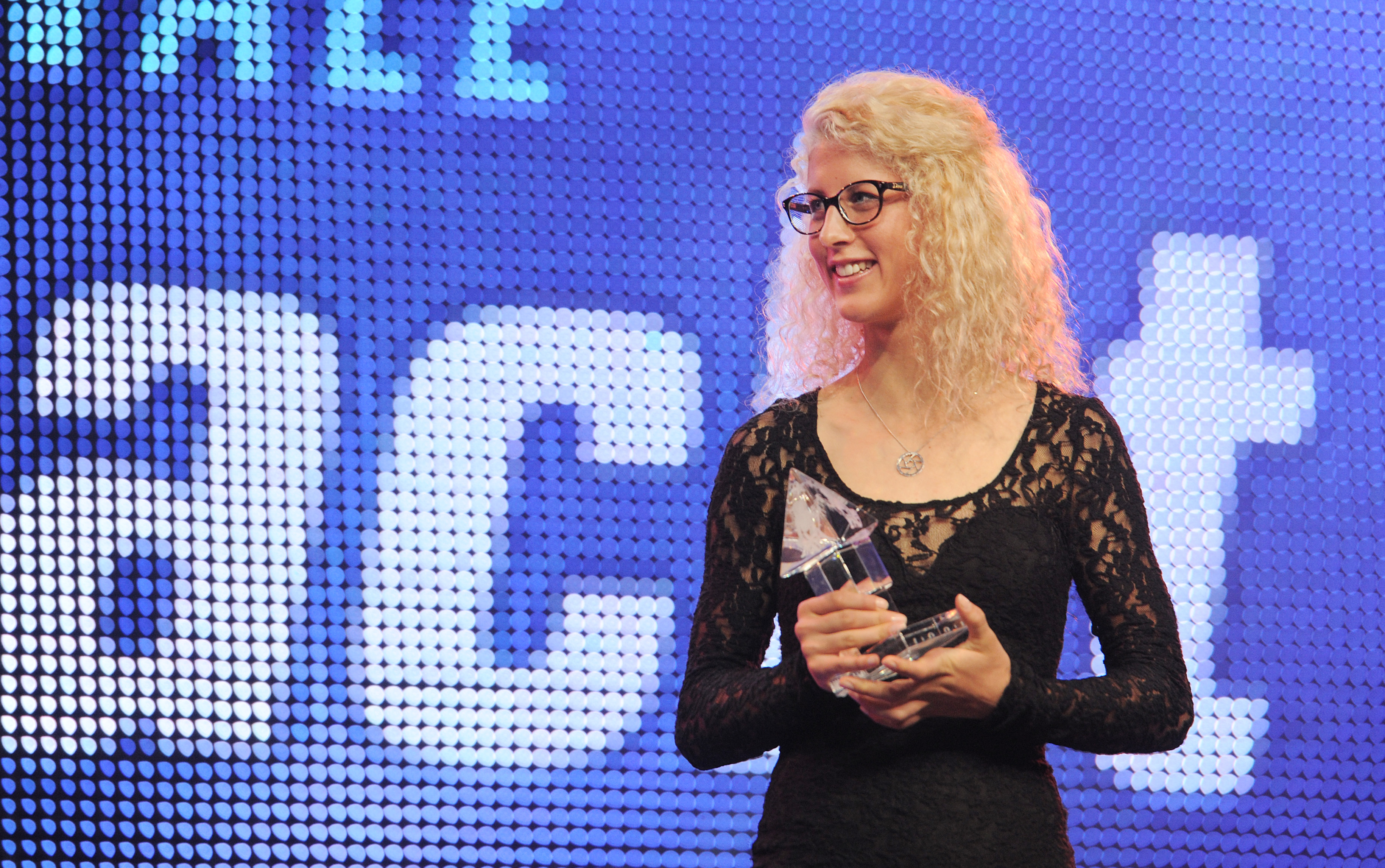 Davos, 03.10.2014. Sport, 12. Internationale Sportnacht Davos 2014. Die Mountainbikerin Jolanda Neff wurde mit dem Davoser Kristall 2014 ausgezeichnet.. Copyright by: foto-net / Kurt Schorrer